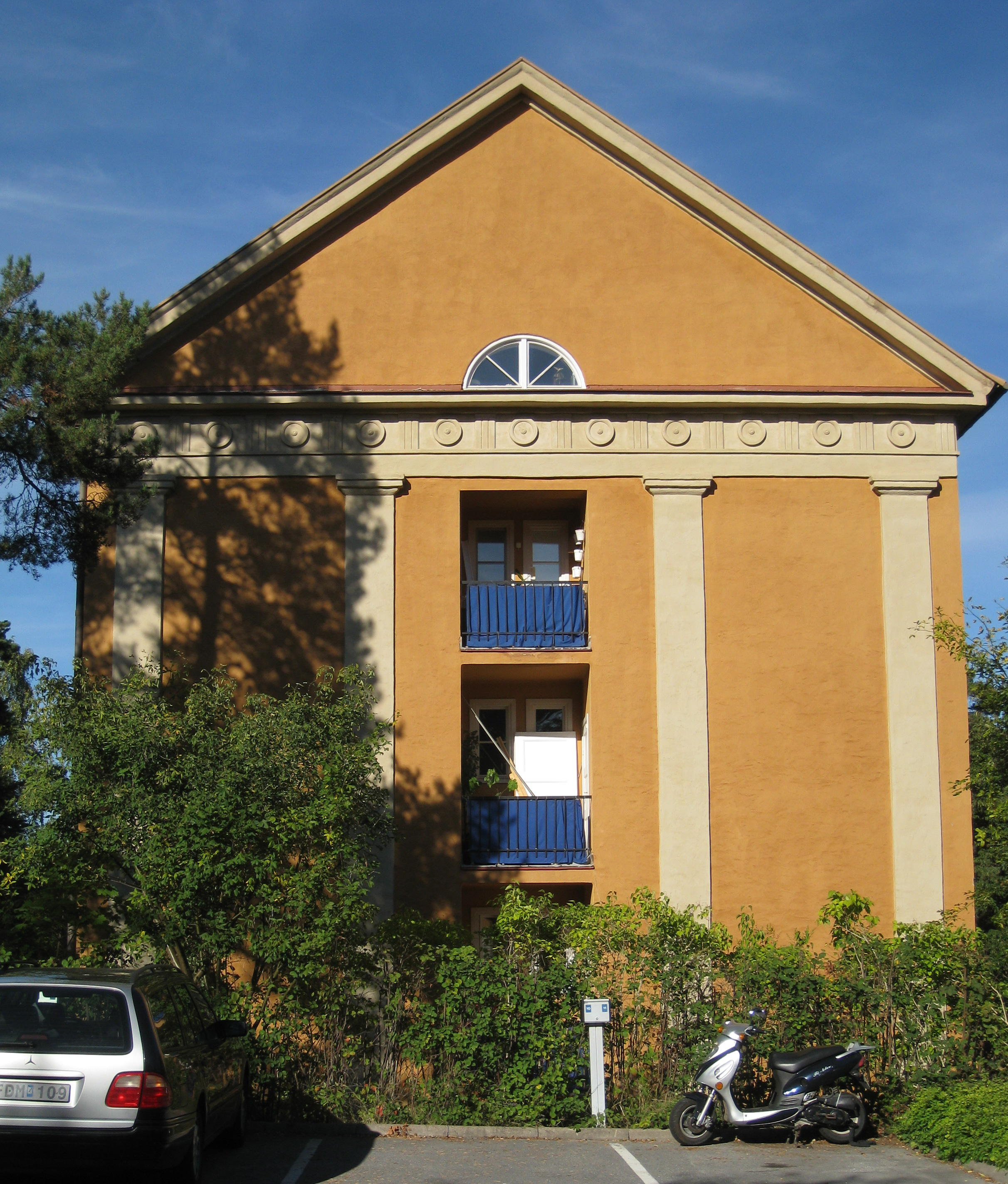 Lärarinnehemmet Tennhjärtat, Smedslätten. Huset ligger i kvarteret Tennhjärtat, Herman Ygbergs väg 2-10 i Smedslätten, Bromma. Vy av södra fasaden med klassiska gavelmotiv och pilastrar.